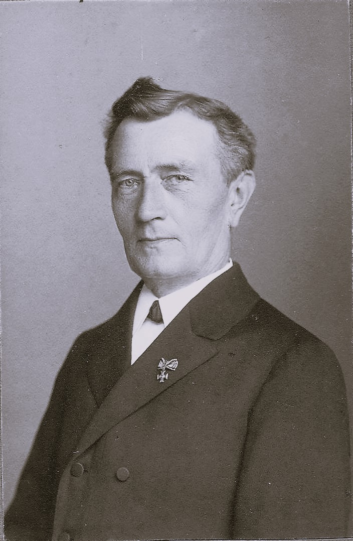 Rektor Strakerjahn.